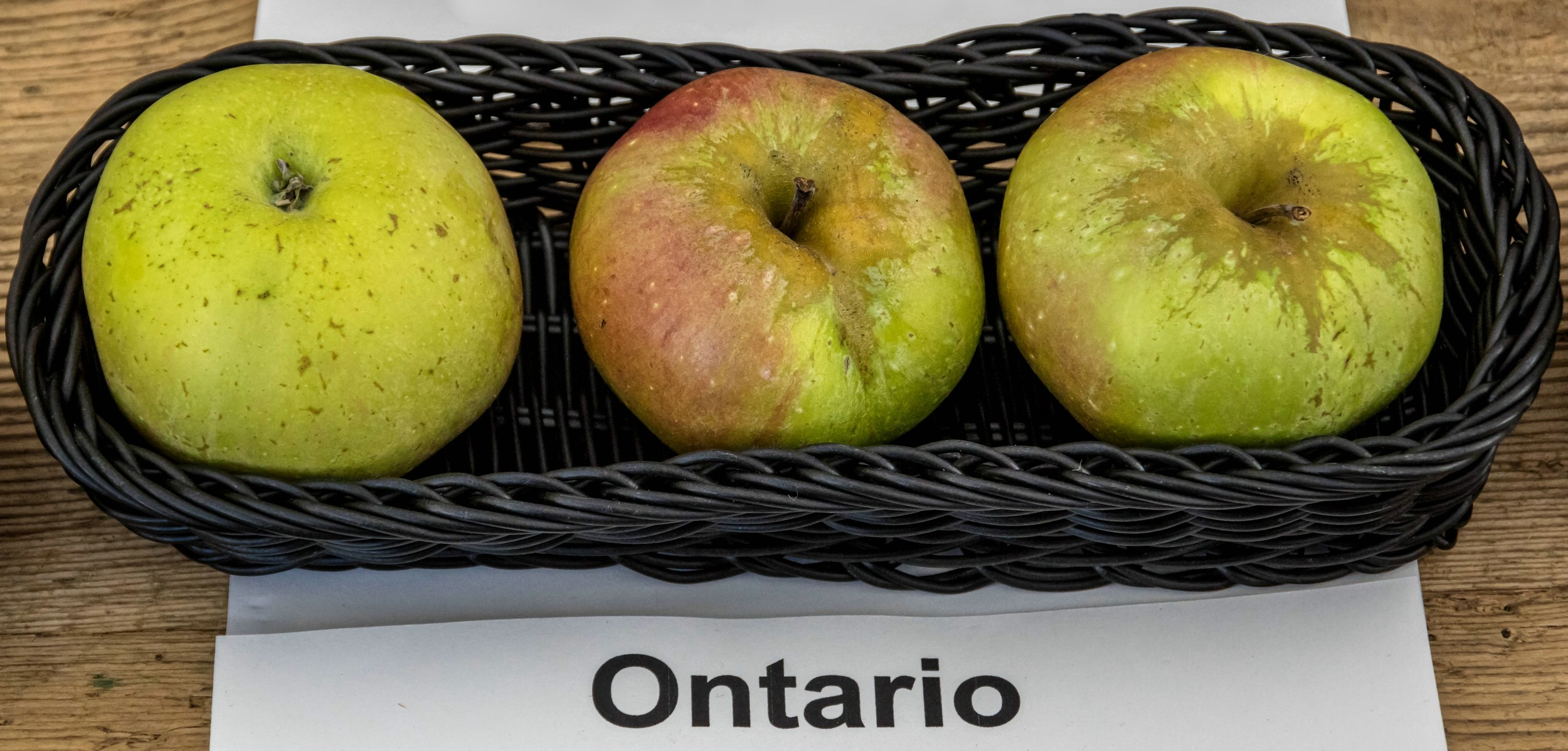 Alte Apfelsorten, von denen es im Badischen noch tragende Bäume gibt. Alle Aufnahmen au dem Oktober 2015